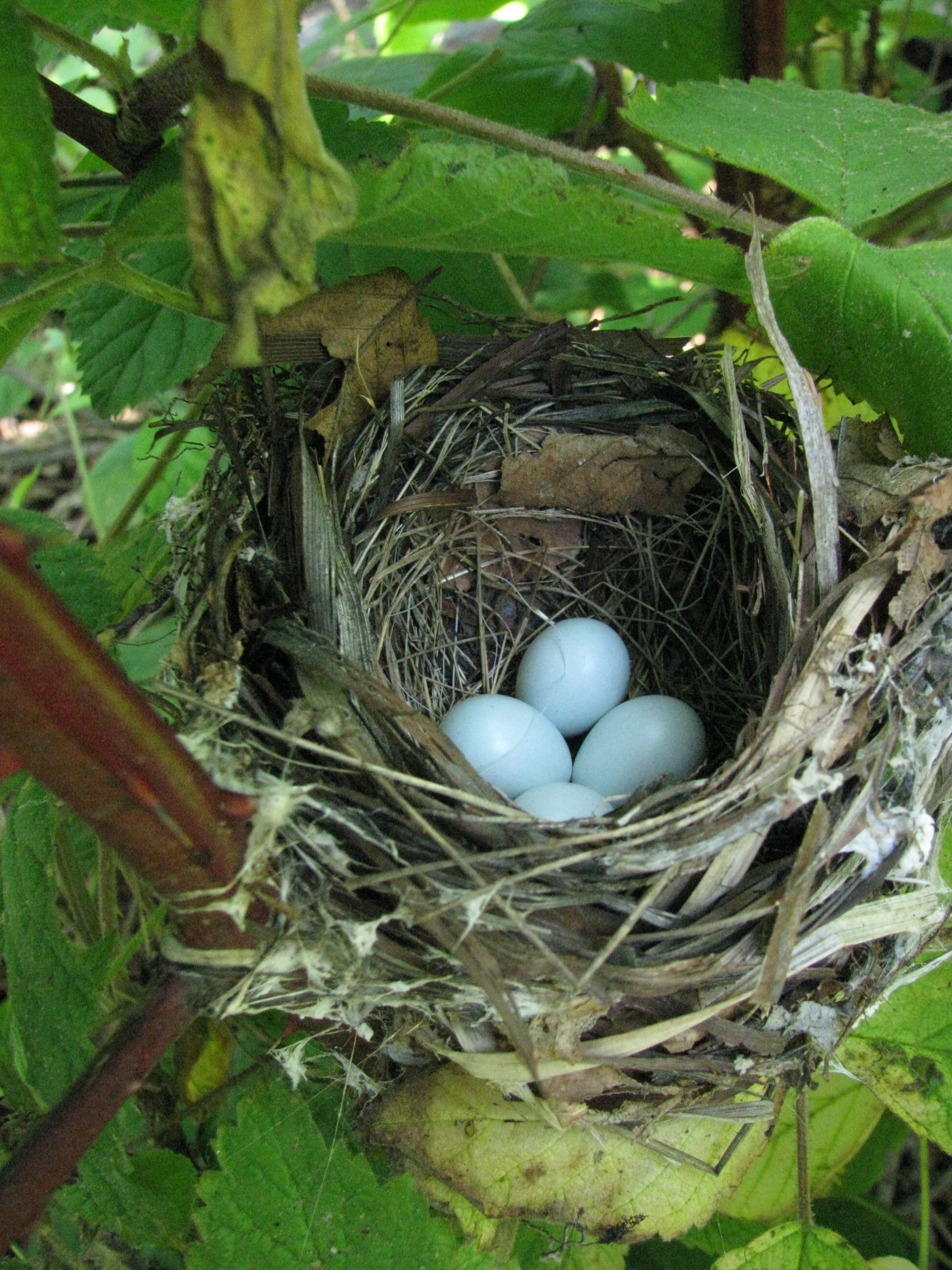 Indigo Bunting nest